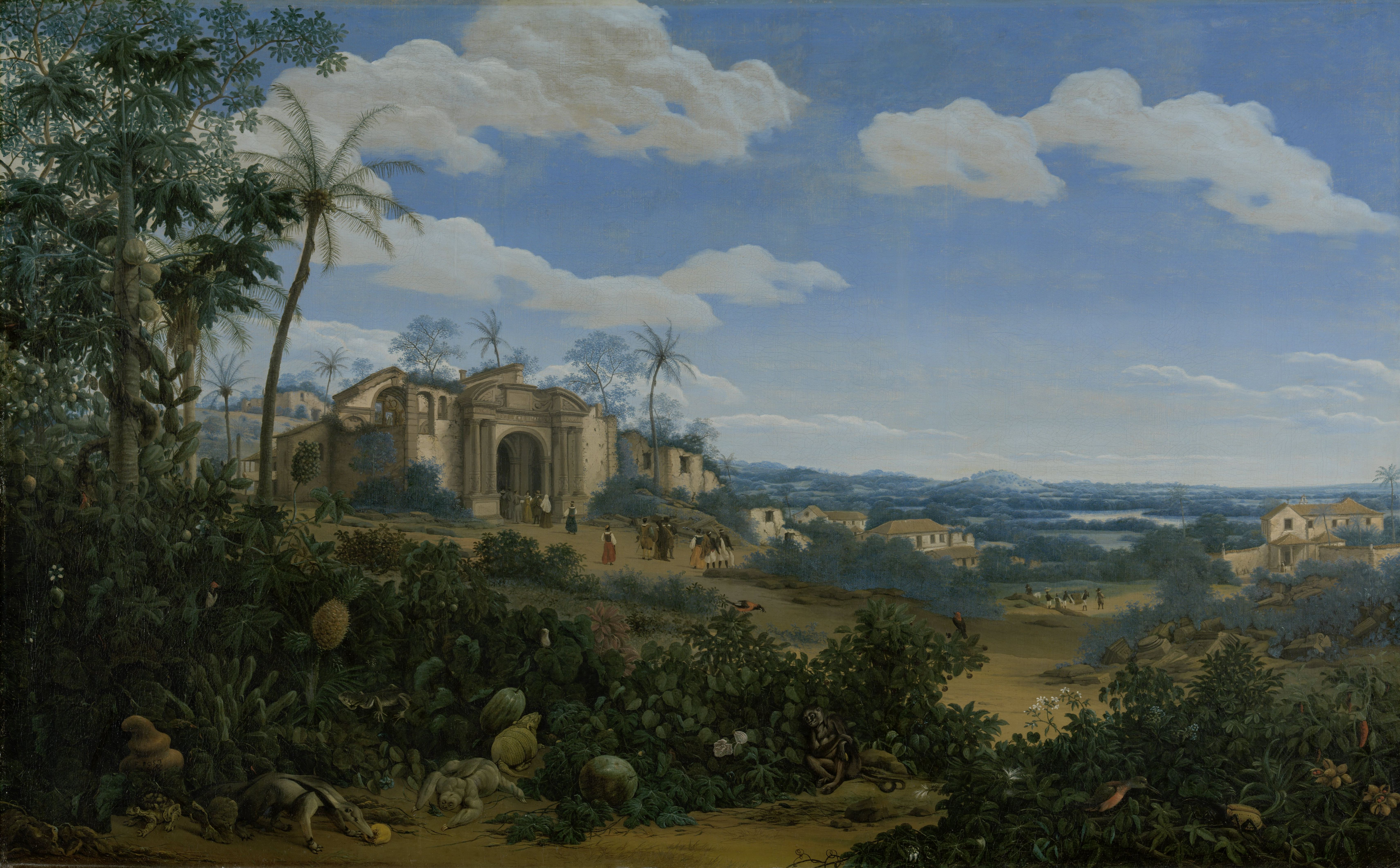 Gezicht op Olinda in Brazilië. Links op een heuvel een groep mensen bij de ruïne van de kerk. Op de voorgrond tropische planten, vruchten en dieren (armadillo, aap, luiaard, miereneter, hagedis).; Frans Jansz Post (1612–1680), olieverf op doek, 1662